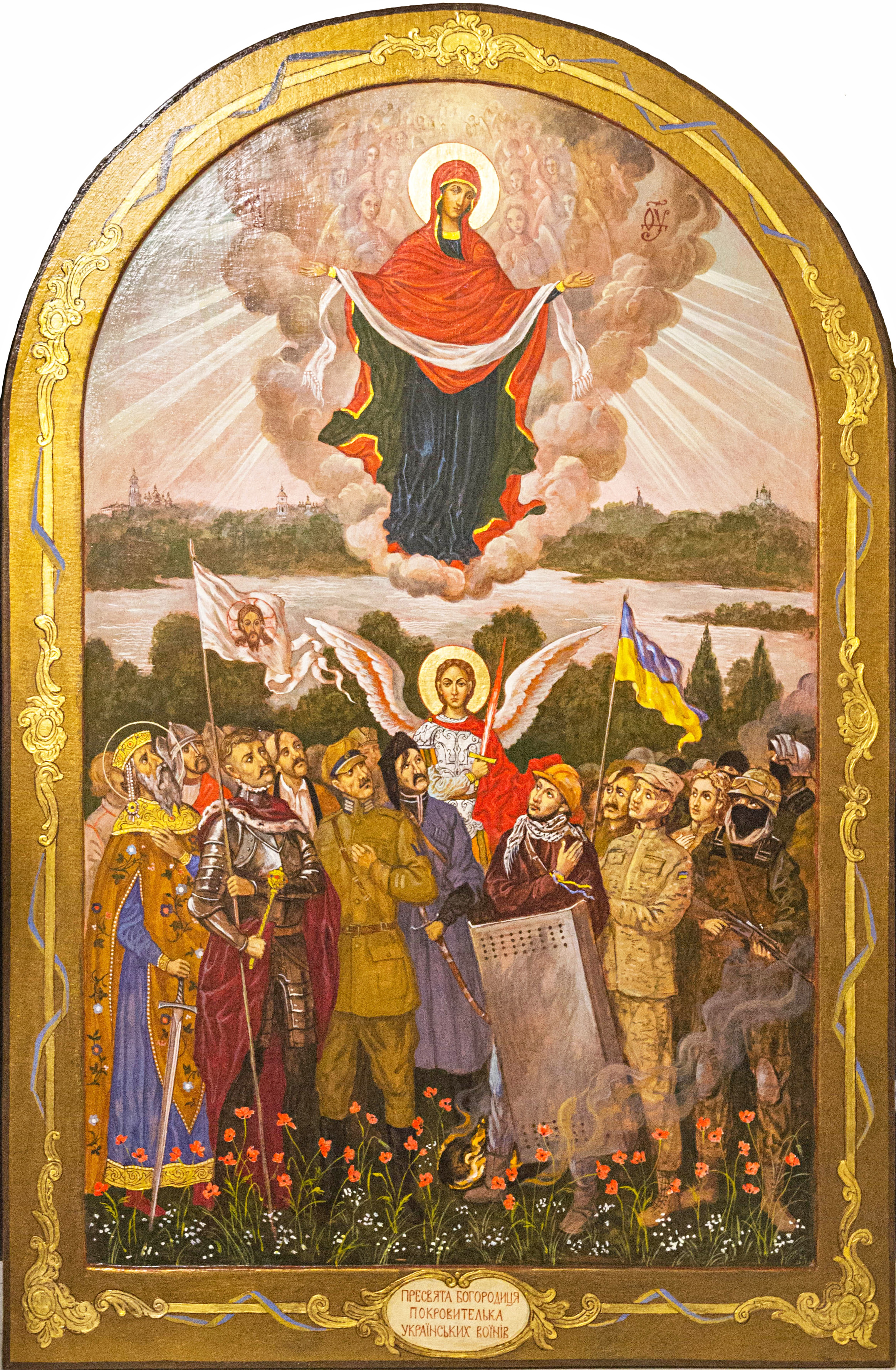 Богородиця - покровителька українських воїнів У Михайлівському Золотоверхому монастирі в Києві освячено ікону Пресвятої Богородиці - покровительки українських воїнів. Скорочено цю ікону називають - Богородиця "воїнська". Освячена ікона містить зображення Божої Матері, яка тримає в руках омофор і ним покриває українських воїнів. Цей образ шанується в українському народі під назвою "Покрова". З цією іконою вперше учасники бойових дій на сході України, військові священики та волонтери візьмуть участь у щорічній великій Хресній ході в День Хрещення Руси-України. Богородиця — покровителька українських воїнів освячена Митрополитом Епіфанієм у 2017 році. На іконі зображені українські воїни різних епох, зокрема Святий Рівноапостольний Князь Володимир Великий, руський воїн, Гетьман України Іван Мазепа в похідних військових латах, січові козаки, старшини Армії УНР в одностроях Третьої «Залізної» дивізії, козак Полку Чорних запорожців, воїни Української Галицької Армії, Української Повстанської Армії, боєць «Самооборони Майдану», вояки добровольчих батальйонів, сучасні українські воїни АТО, які зібралися навколо постаті небесного покровителя українського воїнства Архистратига Божого Михаїла. Копії ікони знаходяться у Церкві святого Миколая «Пам'яті жертв Чорнобиля».